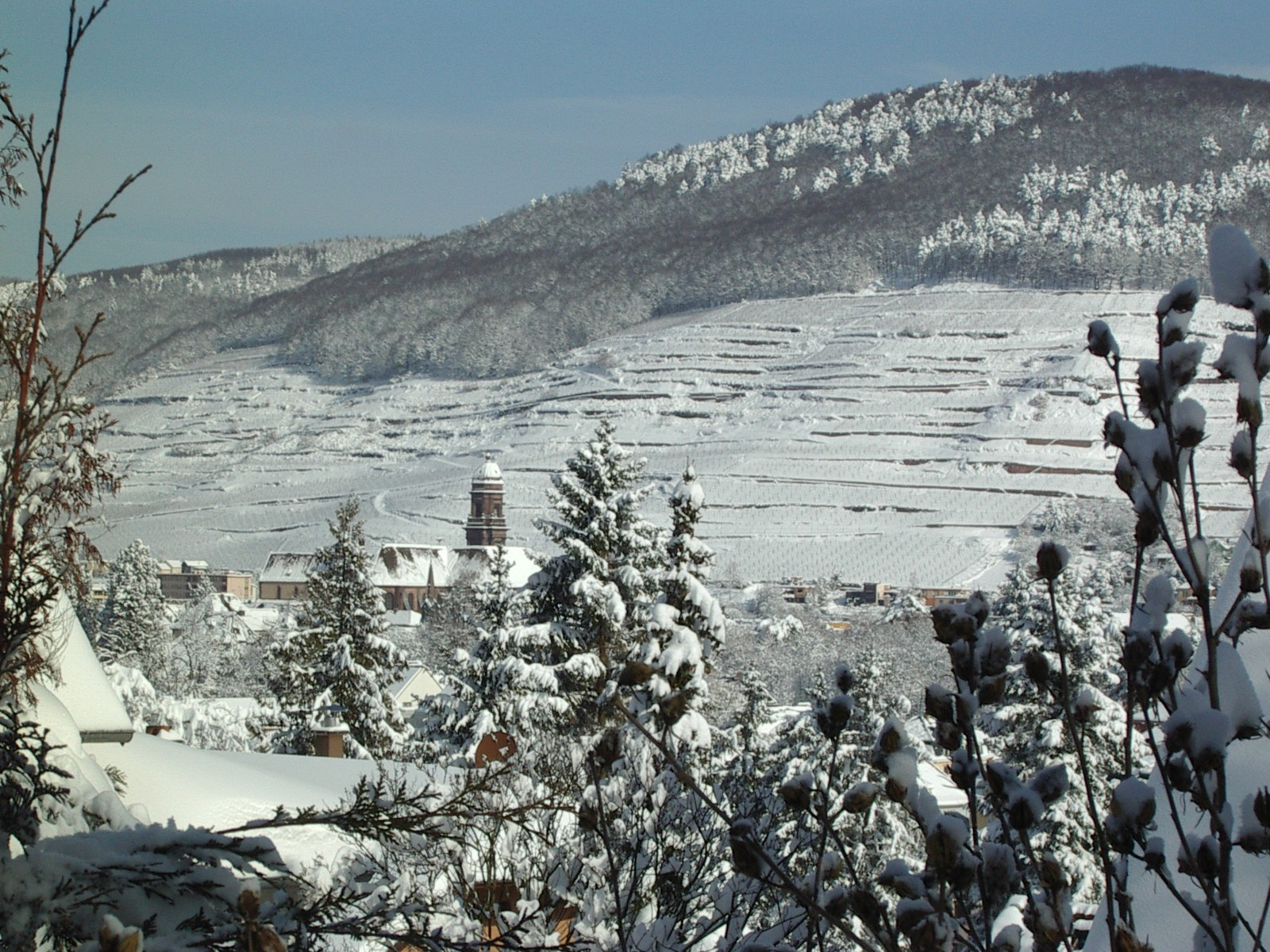 Guebwiller sous la neige le 5 mars 2006